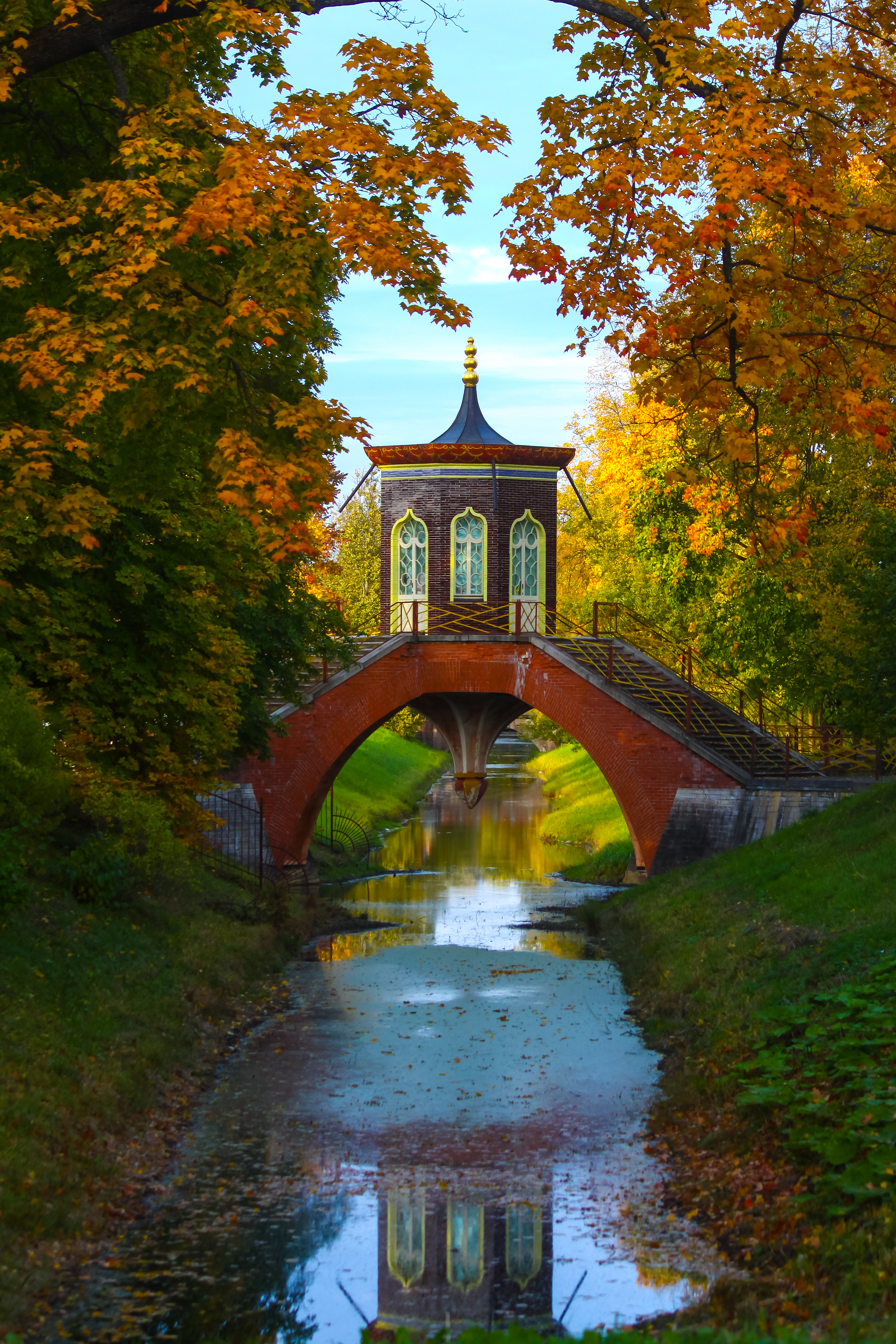 Мост Крестовый с беседкой (Санкт-Петербург и Лен.область, Пушкин, через Крестовый канал)